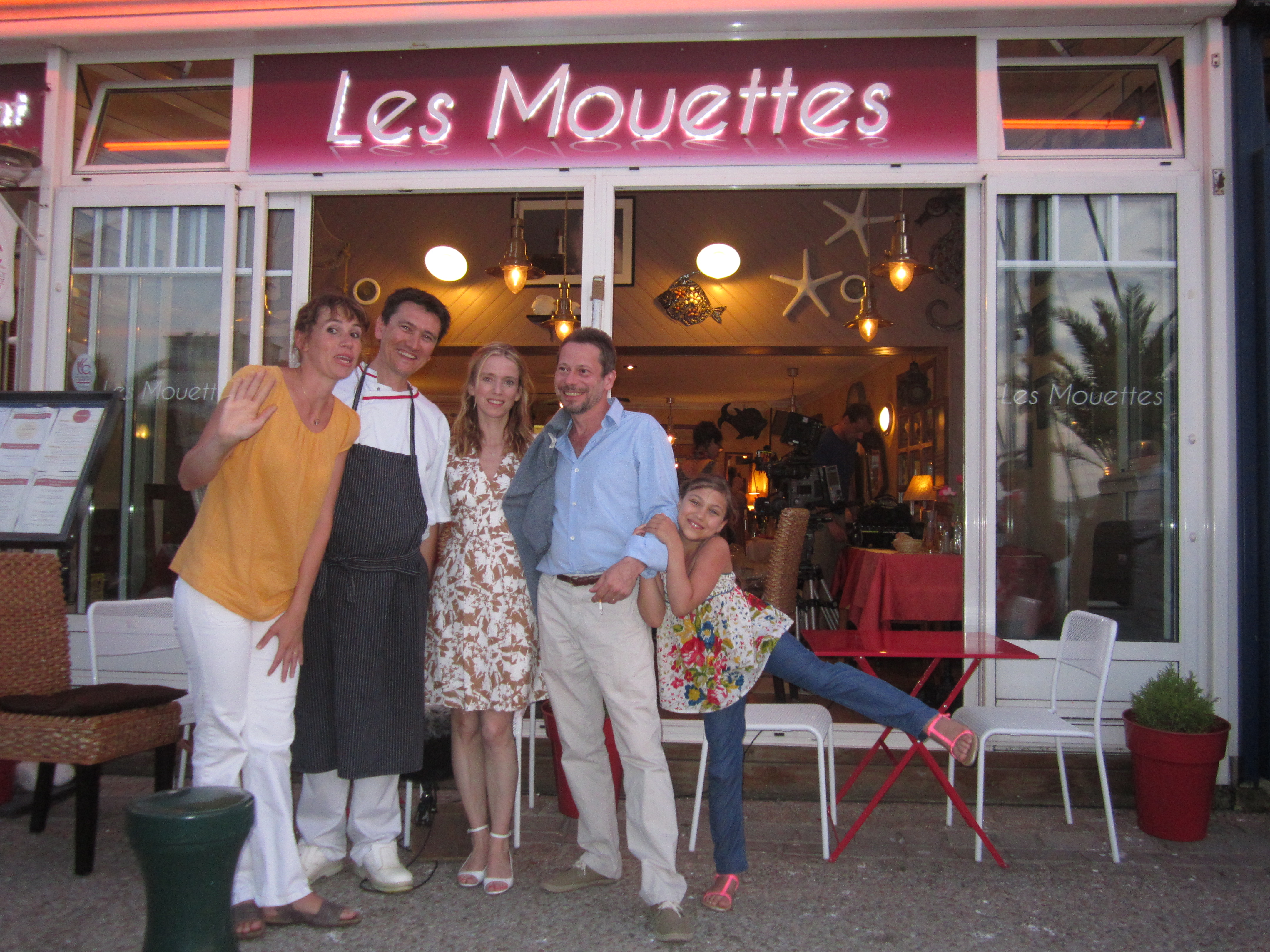 Tournage du film " La Chambre bleue au restaurant Les Mouettes le 15 juillet 2013.Avec Mathieu Amalric et Léa Drucker.